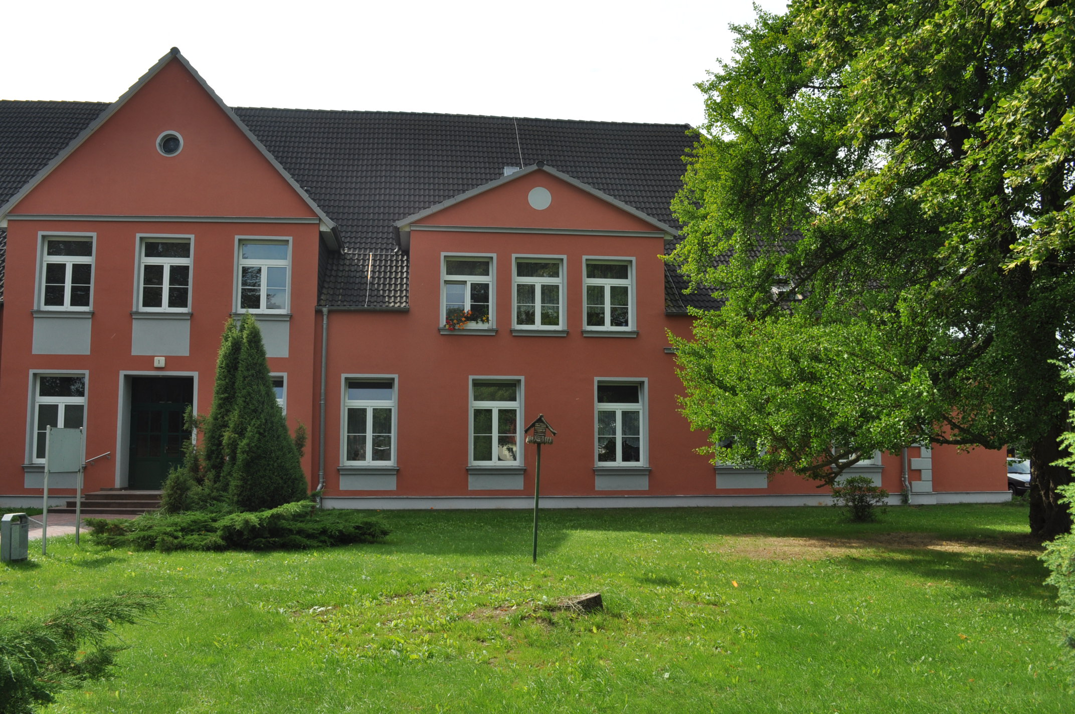 Aufnahme des Gutshauses Wahrstorf. Zu sehen ist die rechte vordere Seite des Haupthauses